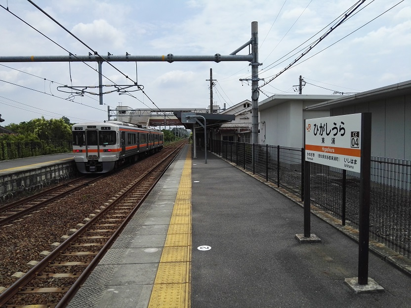 Higashiura station platform